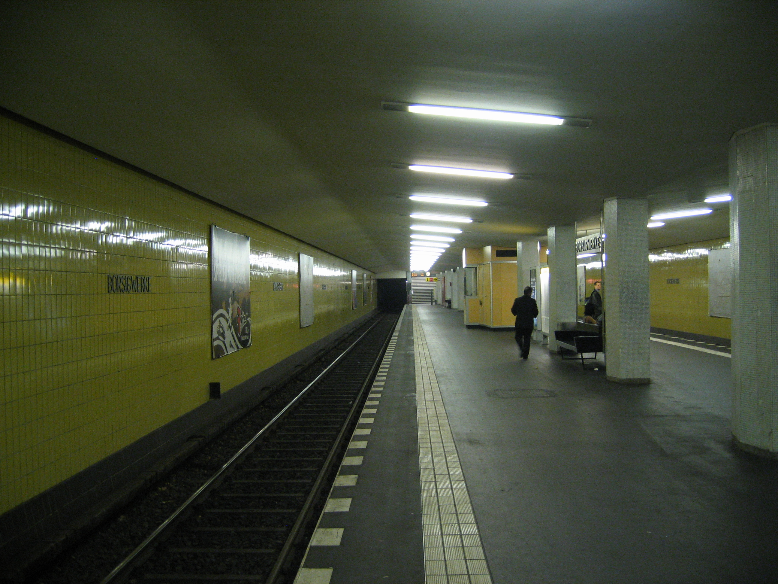 U-Bahnhof Borsigwerke, Berlin